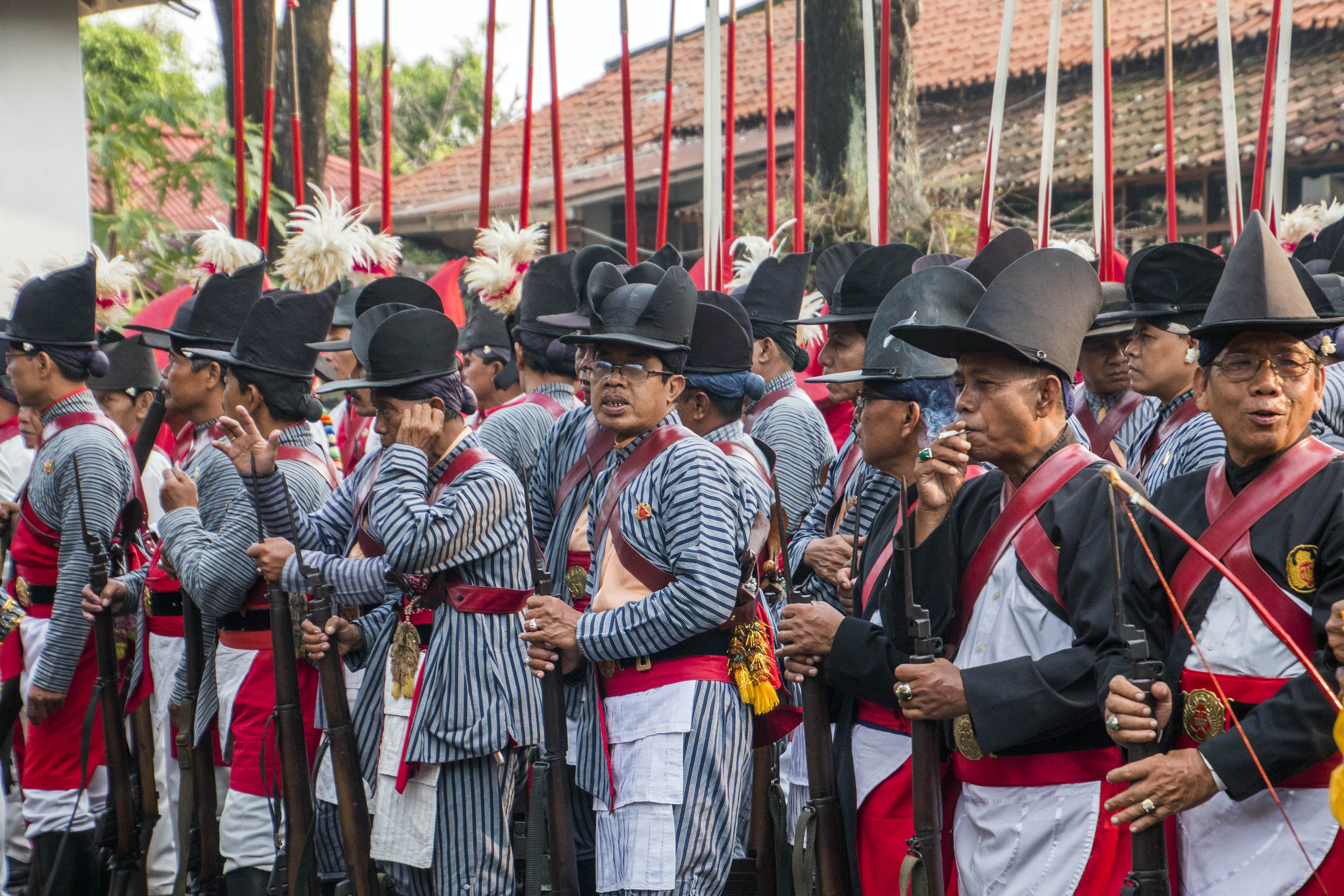 Barisan prajurit kraton sesaat sebelum upacara Grebeg Maulid di halaman Gudang Senjata Kraton Ngayogyakarta Hadiningrat.